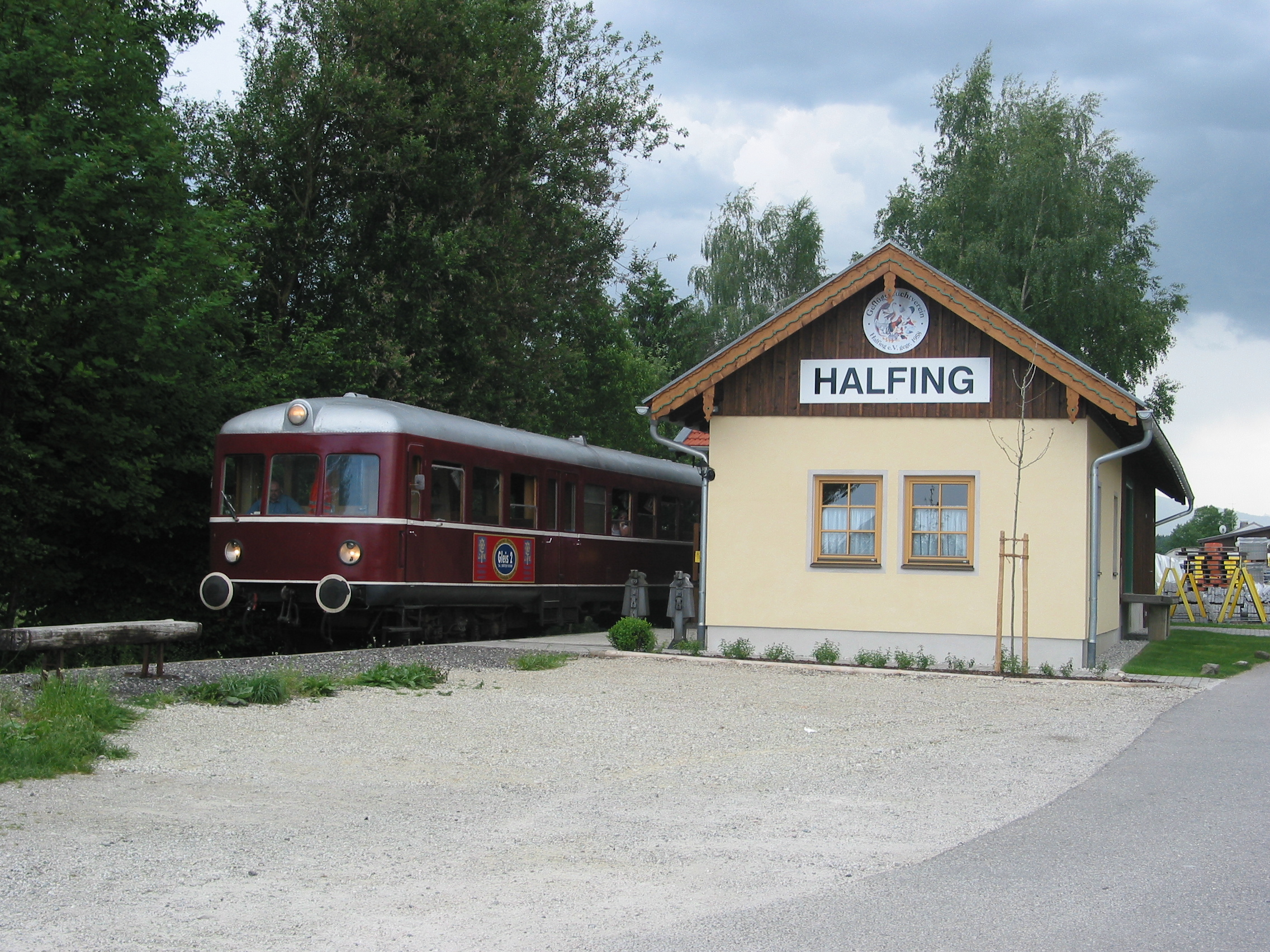 VT 103 der Lokalbahn Endorf–Obing in Halfing bei einer Studienfahrt der DGEG.